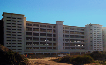 Het SBP gebouw op STRIJP-S te Eindhoven waar de werkplaats/lab van Materializer Industries gevestigd is.